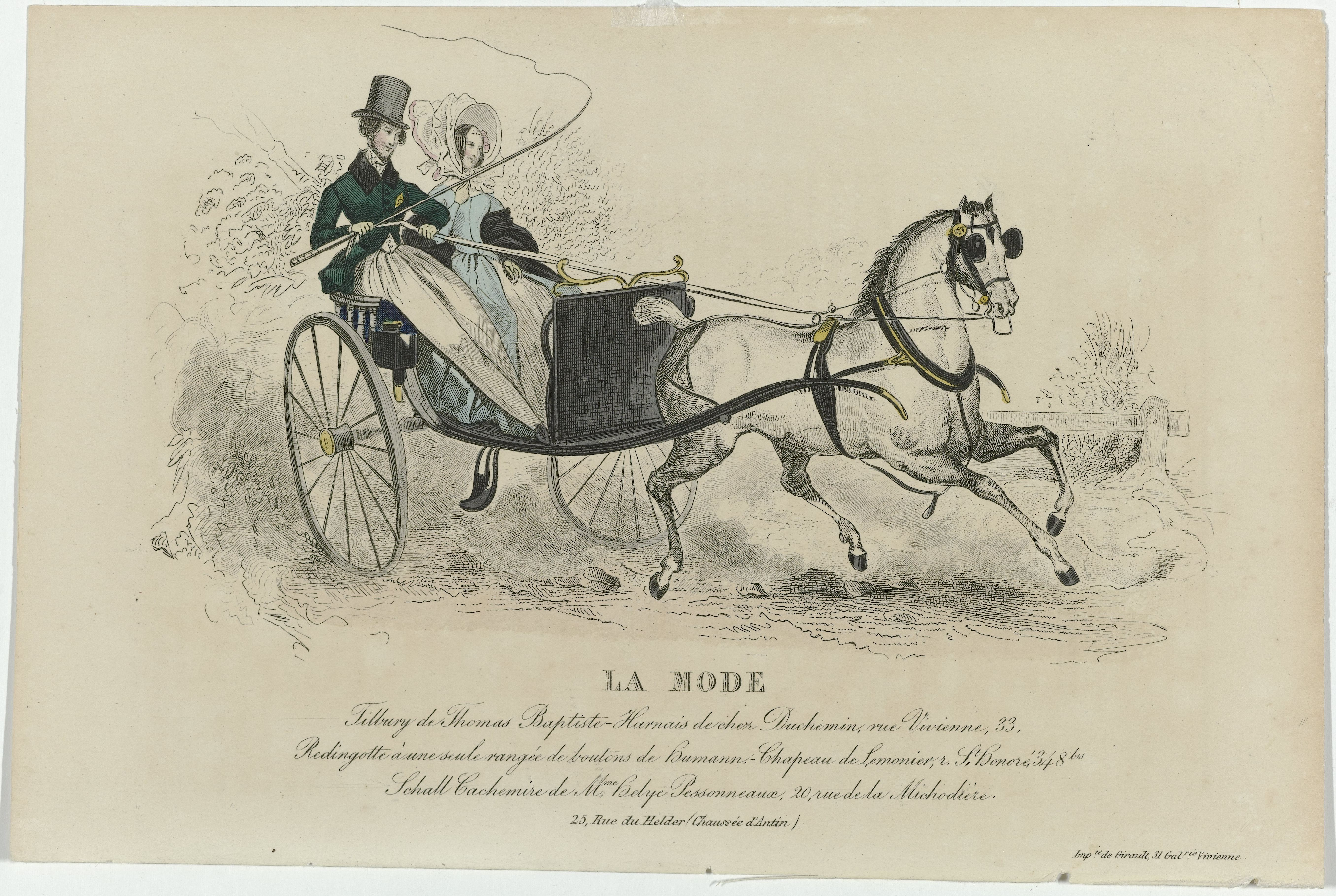 IdentificatieTitel(s): La Mode, ca. 1837 : Tilbury de Thomas Baptiste-Harnais (...)Objecttype: modeprent Objectnummer: RP-P-2009-3083Opschriften / Merken: titel, midden onder in de marge, gegraveerd: ‘La Mode.’onderschrift, midden onder in de marge, gegraveerd: ‘Tilbury de Thomas Baptiste-Harnais de chez Duchemin, rue Vivienne, 33. Redingotte à une seule rangée de boutons de Humann. - Chapeau de Lemonier, r. St. Honoré, 348 bis Schall Cachemire de M"me Helye Pessonneaux, 20, rue de la Michodière.’adres, midden onder in de marge, gegraveerd: ‘25, Rue du Helder ( Chaussée d'Antin )’Omschrijving: Man en vrouw in een rijtuig met grote Wie: len en één paard ofwel de 'Tilbury', van Thomas Baptiste. Paardentuig van Duchemin. Redingote met één rij knopen, van Humann. Hoed van Lemonier. Sjaal van kasjmier van Helye Pessonneaux. Prent uit het modetijdschrift La Mode (1829-1855).VervaardigingVervaardiger: prentmaker: anoniemuitgever: Alfred Xavier du Fougeraisuitgever: Th. Muretdrukker: Girault (vermeld op object)Plaats vervaardiging: ParijsDatering: ca. 1837Fysieke kenmerken: gravure, ets en met de hand gekleurdMateriaal: papier Techniek: graveren (drukprocedé) / met de hand kleuren / etsenAfmetingen: blad: h 152 mm × b 230 mmOnderwerpWat: fashion platesdress, gown (+ women's clothes)head-gear (+ women's clothes)clothing for the upper part of the body (SHAWL) (+ women's clothes)head-gear (+ men's clothes)trousers, breeches (+ men's clothes)clothing for the upper part of the body (+ men's clothes)coat (+ men's clothes)whiptwo-wheeled vehicle drawn by one animal (+ two persons ~ traffic and transport)button (+ men's clothes)Wanneer: 1837 - 1837Verwerving en rechtenCredit line: Aankoop uit het F.G. Waller-FondsVerwerving: aankoop 2009Copyright: Publiek domein